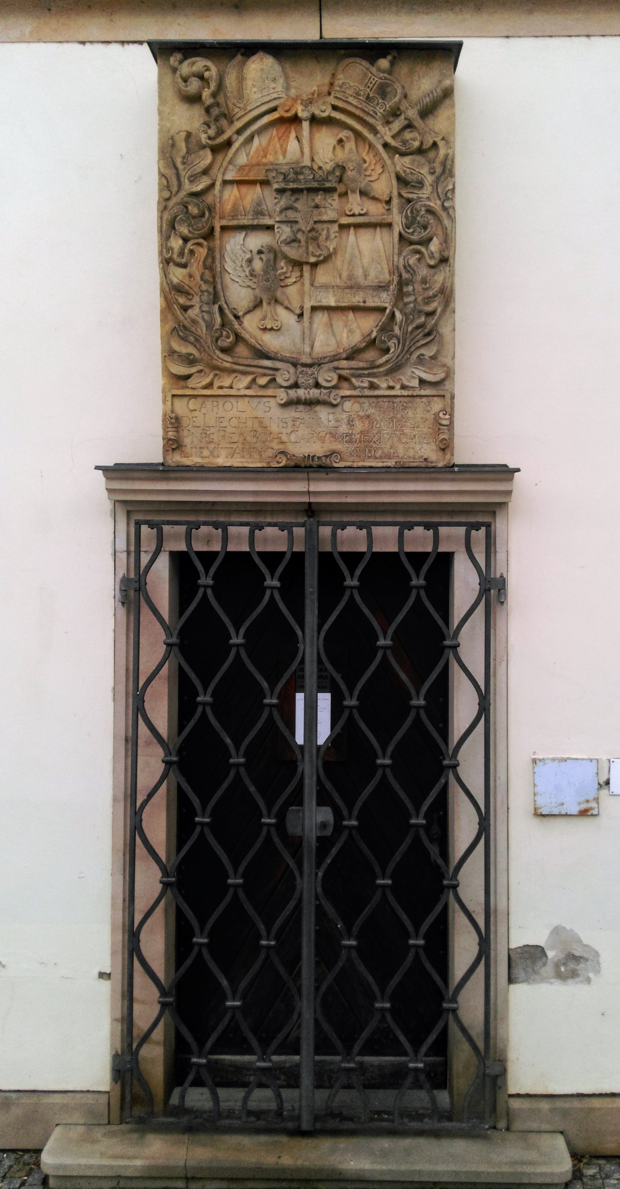 Biskupská mincovna, Na Sladovnách 1491/4, Kroměříž.